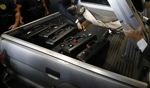 Apreensão dos equipamentos de Contrainteligência do Senado durante a operação Métis